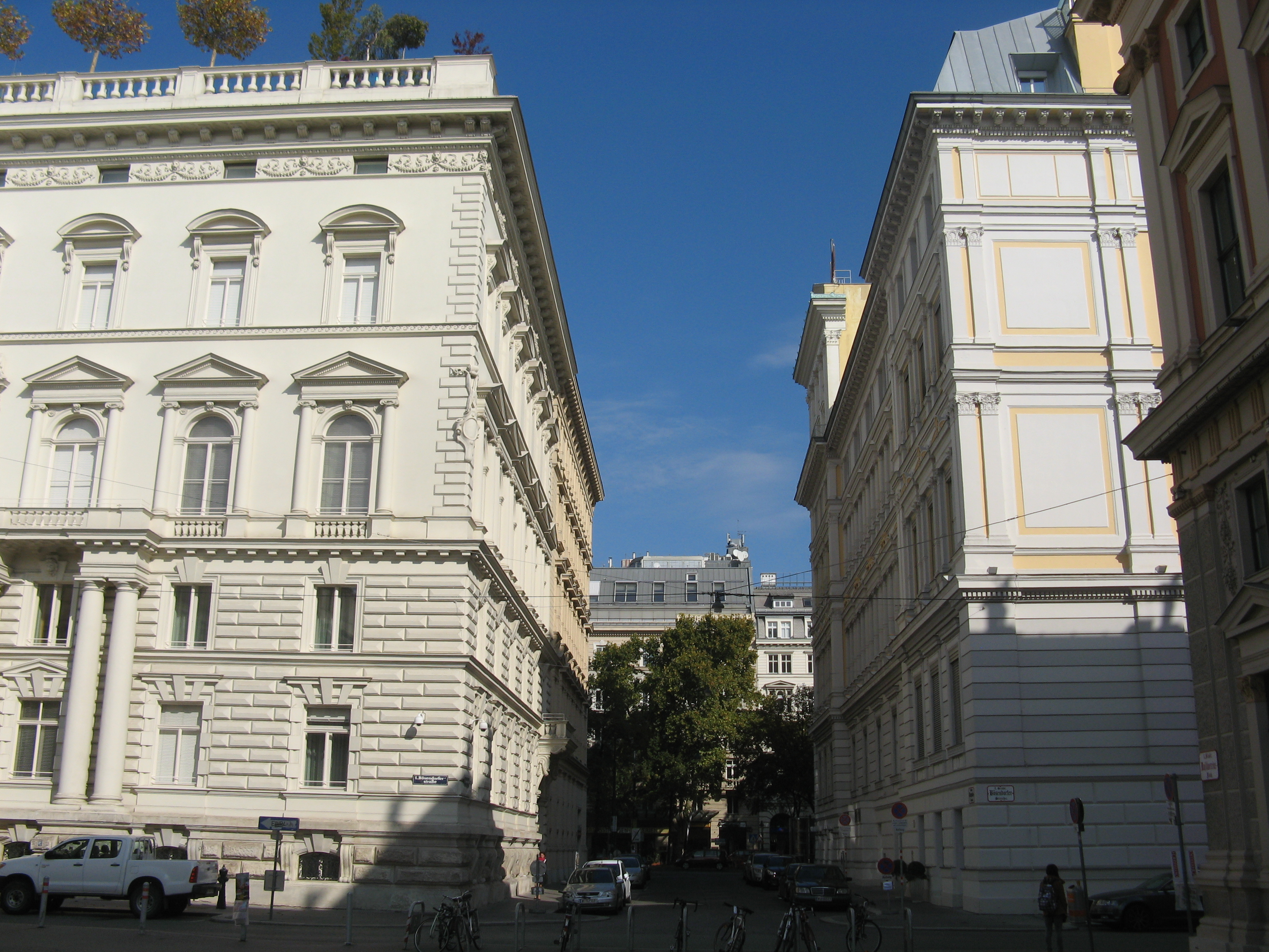 Dumbastraße vom Musikvereinsplatz aus gesehen, Wien-Innere Stadt